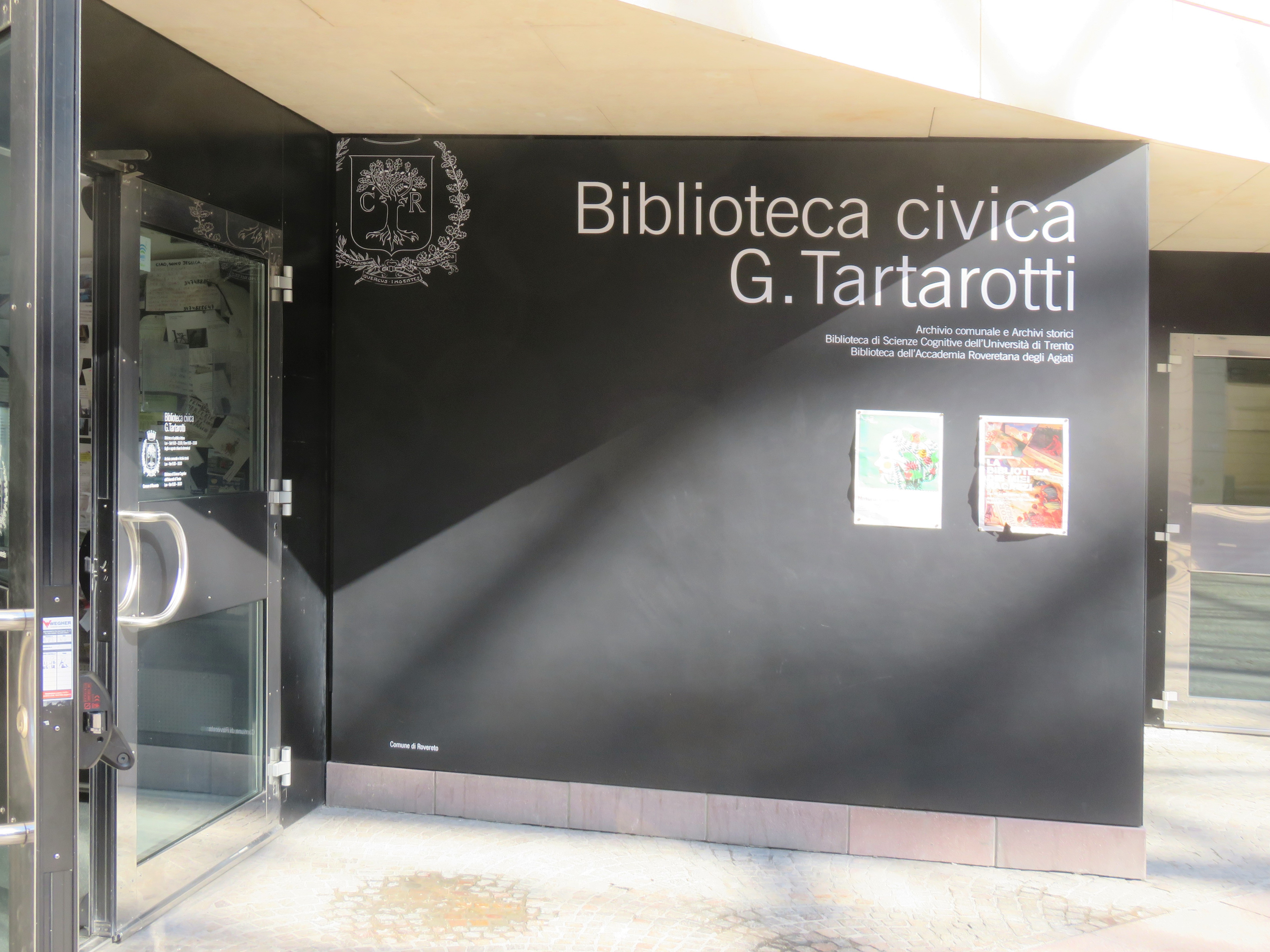 Ingresso principale sotto la cupola del Mart recentemente rinnovato